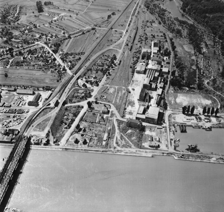 Rheinbefliegung der Alliierten 1953